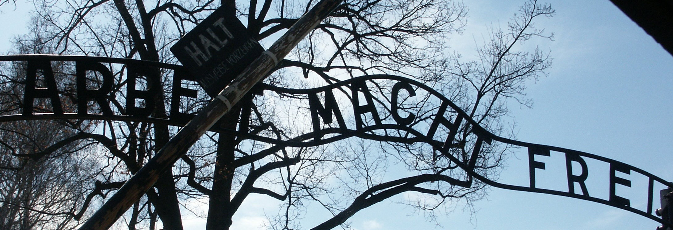 Arbeit macht frei, Stammlager des KZ Auschwitz, 2004, eigene Aufnahme des Autors